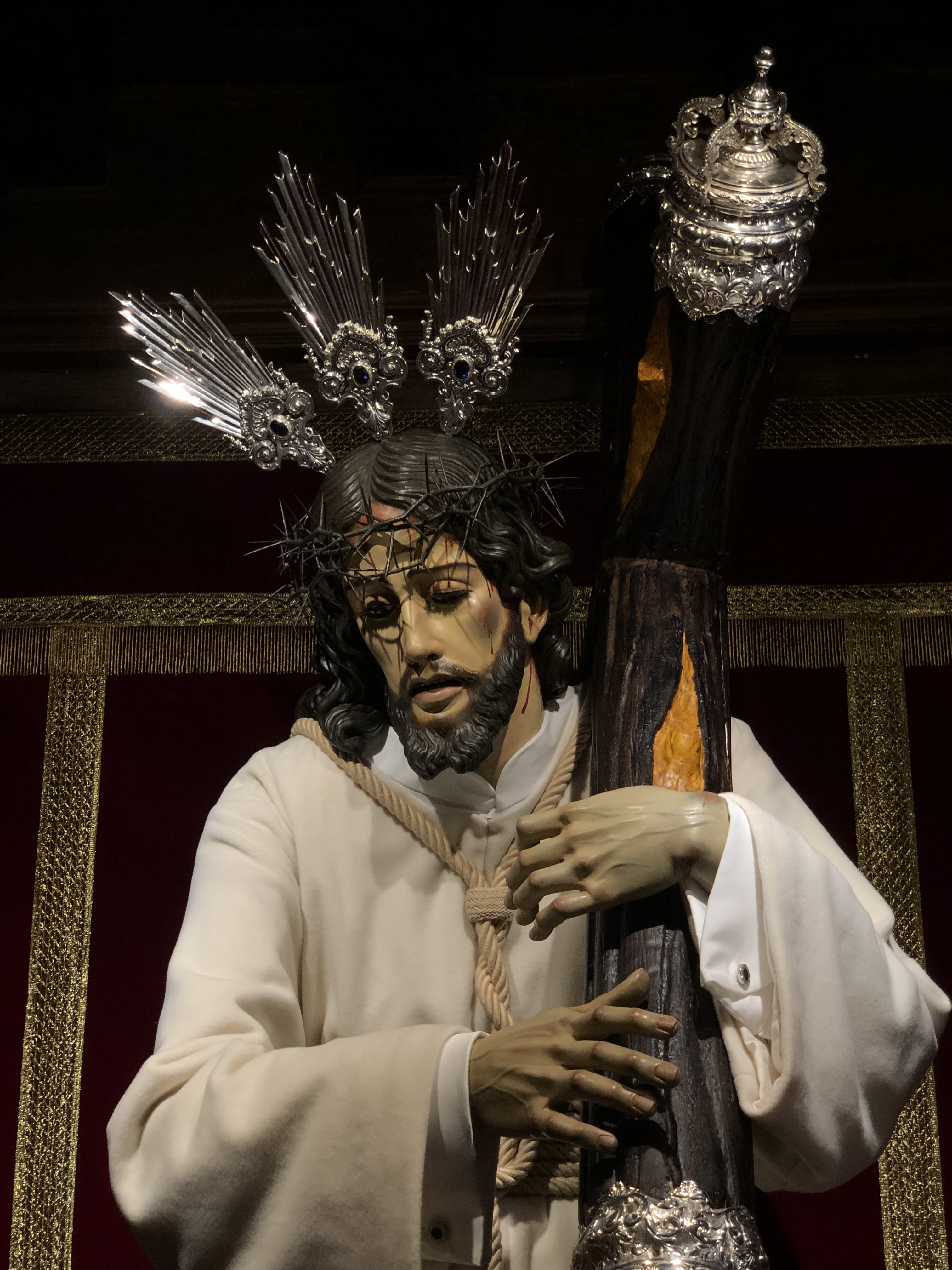 Santisimo Cristo del amor y la entrega